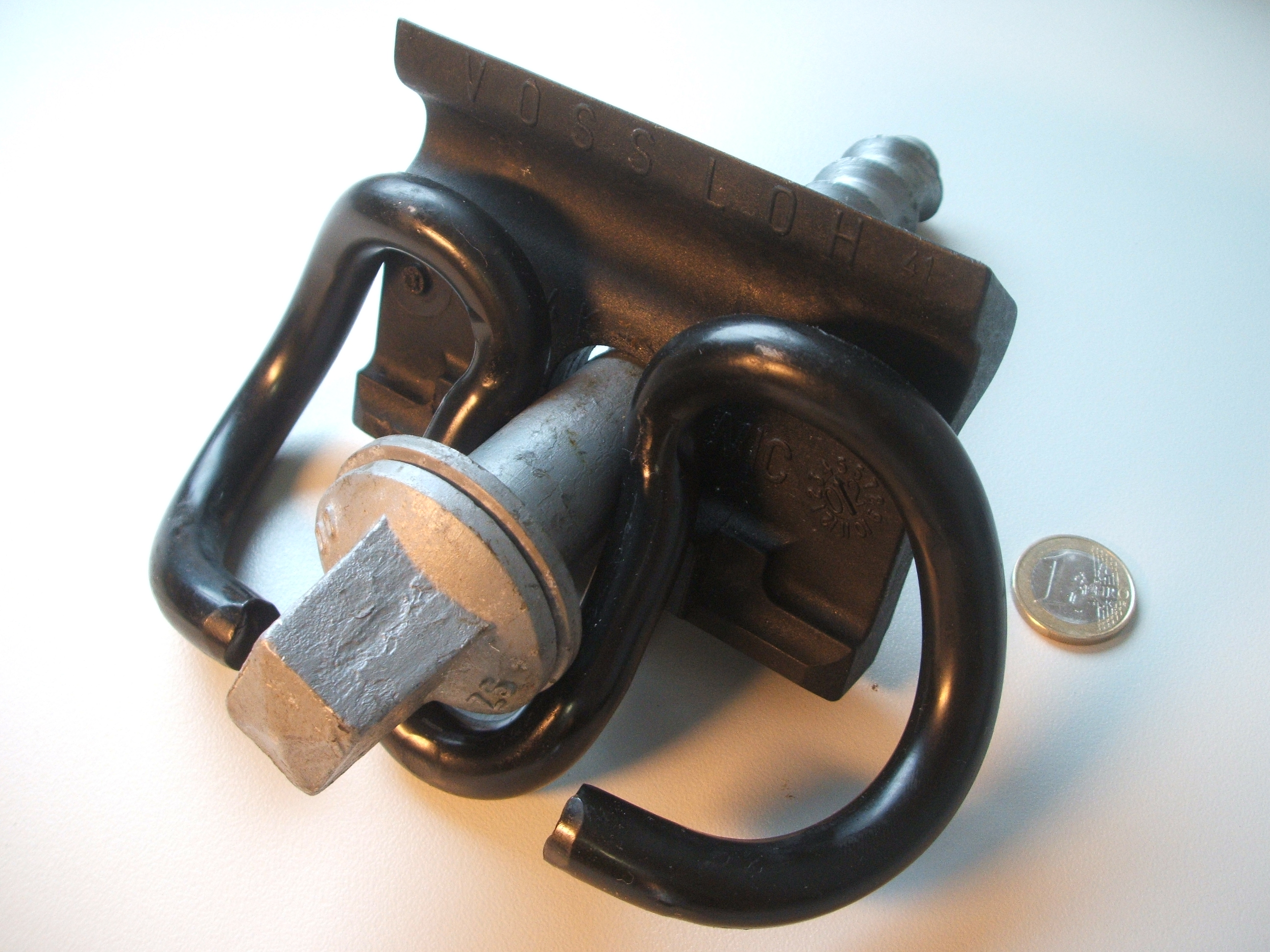 Schienenbefestigungsmittel bei Oberbau W 14: Spannklemme, Schwellenschraube und Winkelführungsplatte von Vossloh, die Spannklemme ist in der falschen Richtung eingesetzt.